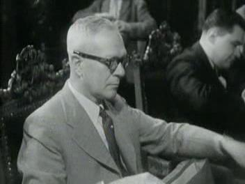 Lubertus Götzen in 1948